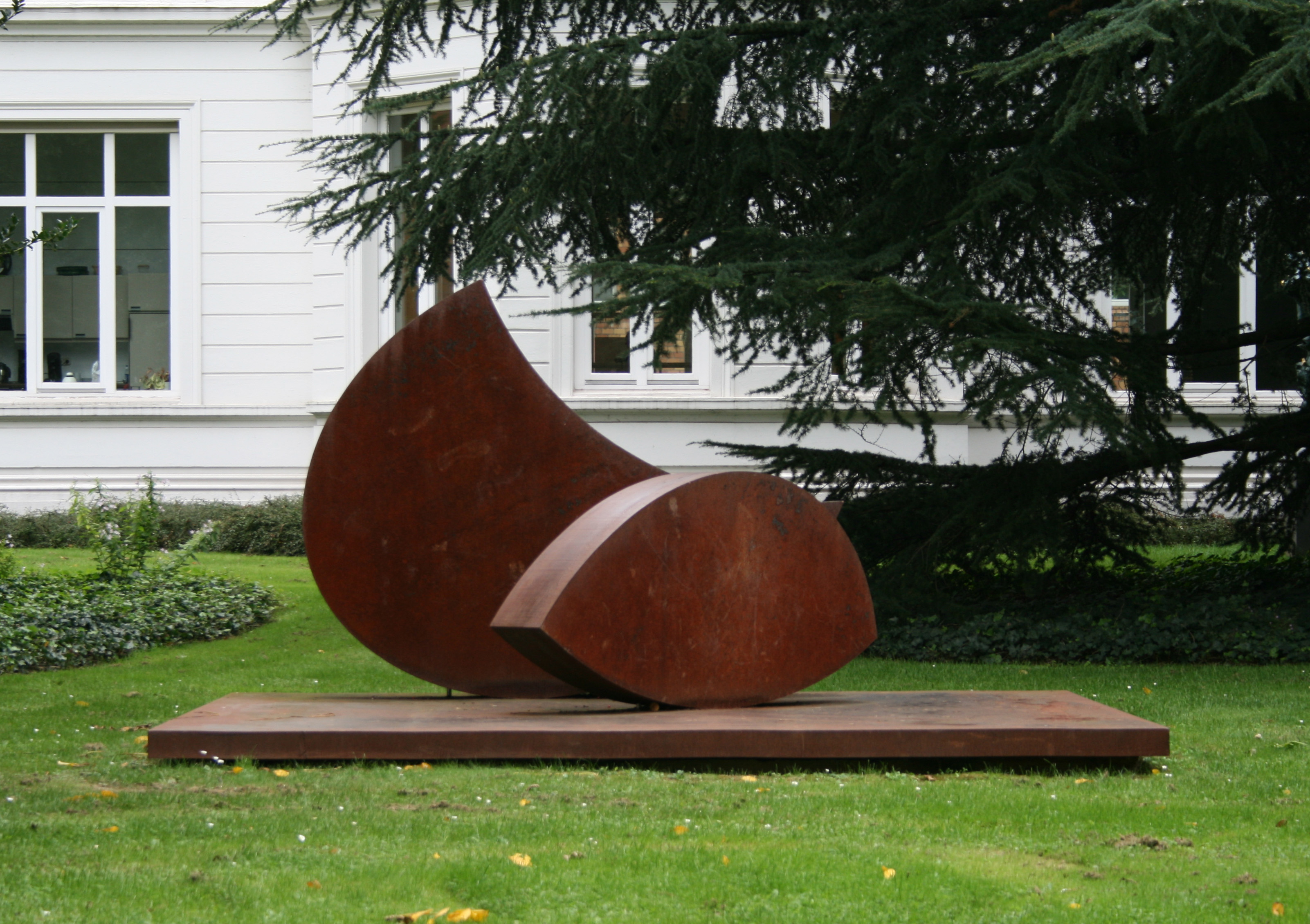 Skulptur "Position im Schwerpunkt" in der Skulpturensammlung Viersen. Selbst fotografiert.